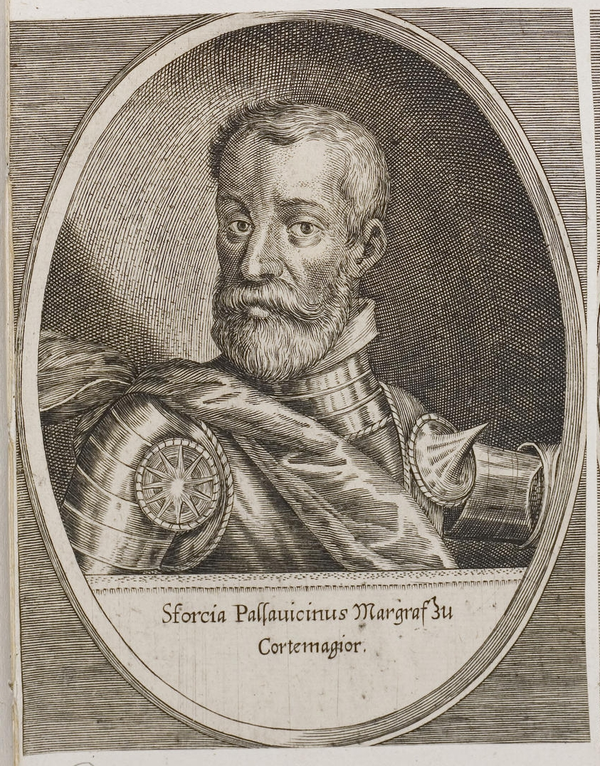 Grafik aus dem Klebeband Nr. 2 der Fürstlich Waldeckschen Hofbibliothek Arolsen Motiv: Sforza Pallavicini († 1585) Authority control GND: 1019746432